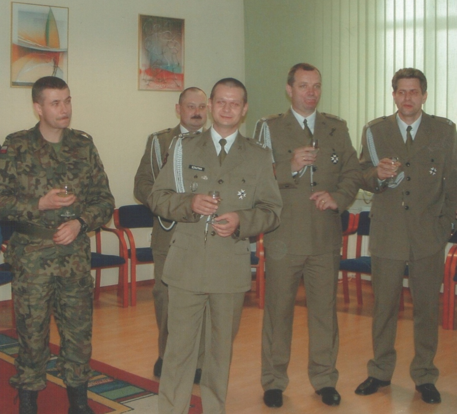 Pożegnanie z 6 BKPanc - ppłk. Arkadiusz Szkutnik